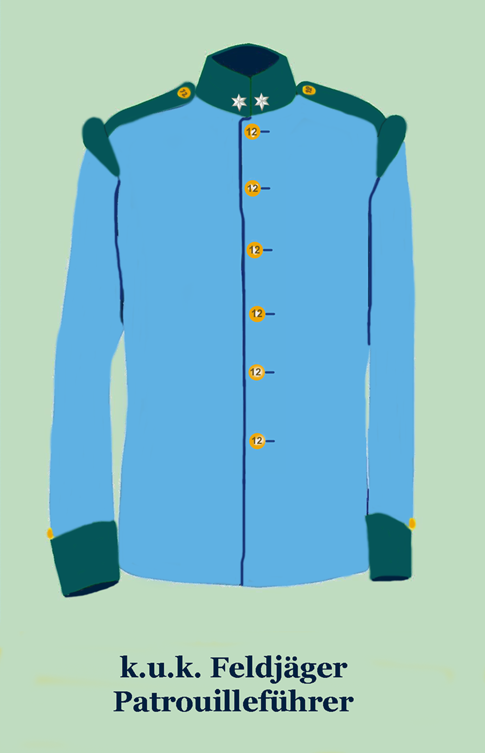 Waffenrock eines Patrouilleführers der k.u.k. Feldjägertruppe. Details und Farben sind der Egalisierungsvorschrift des k.u.k. Kriegsministeriums für die k.u.k. Armee, die k.k. Landwehr, die k.u. Landwehr, die verbundenen Einrichtungen und das Corps der Militär-Beamten von 1867 (Ausgabe von 1912) entnommen.